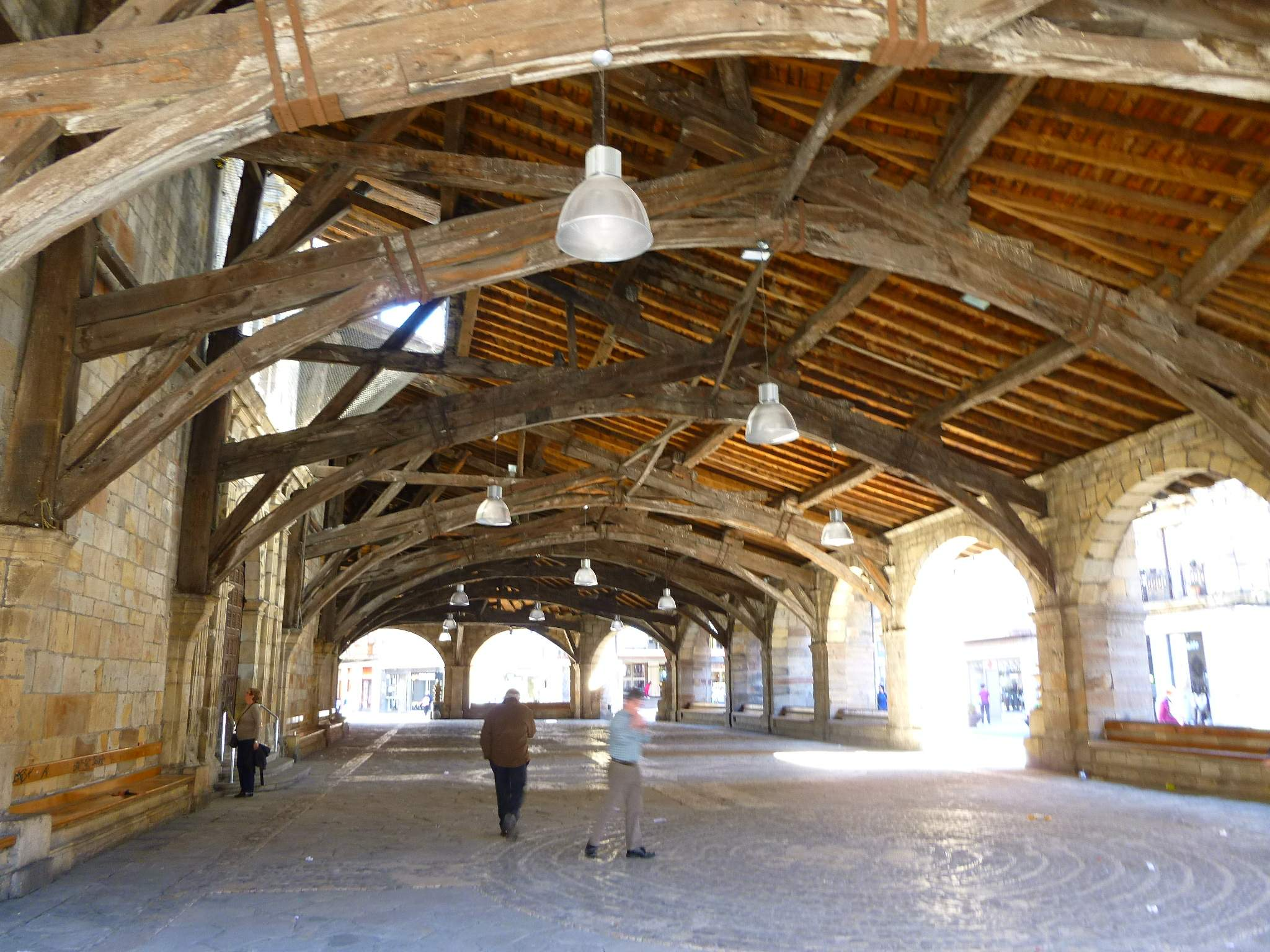 Durango - Iglesia de Santa Maria de Uribarri